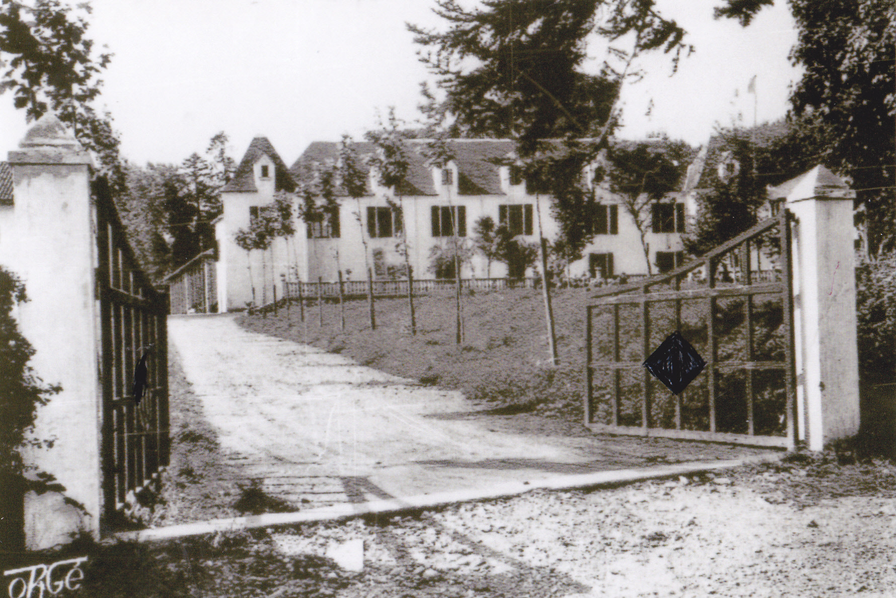 Le château Eth Castet dans les années 1940